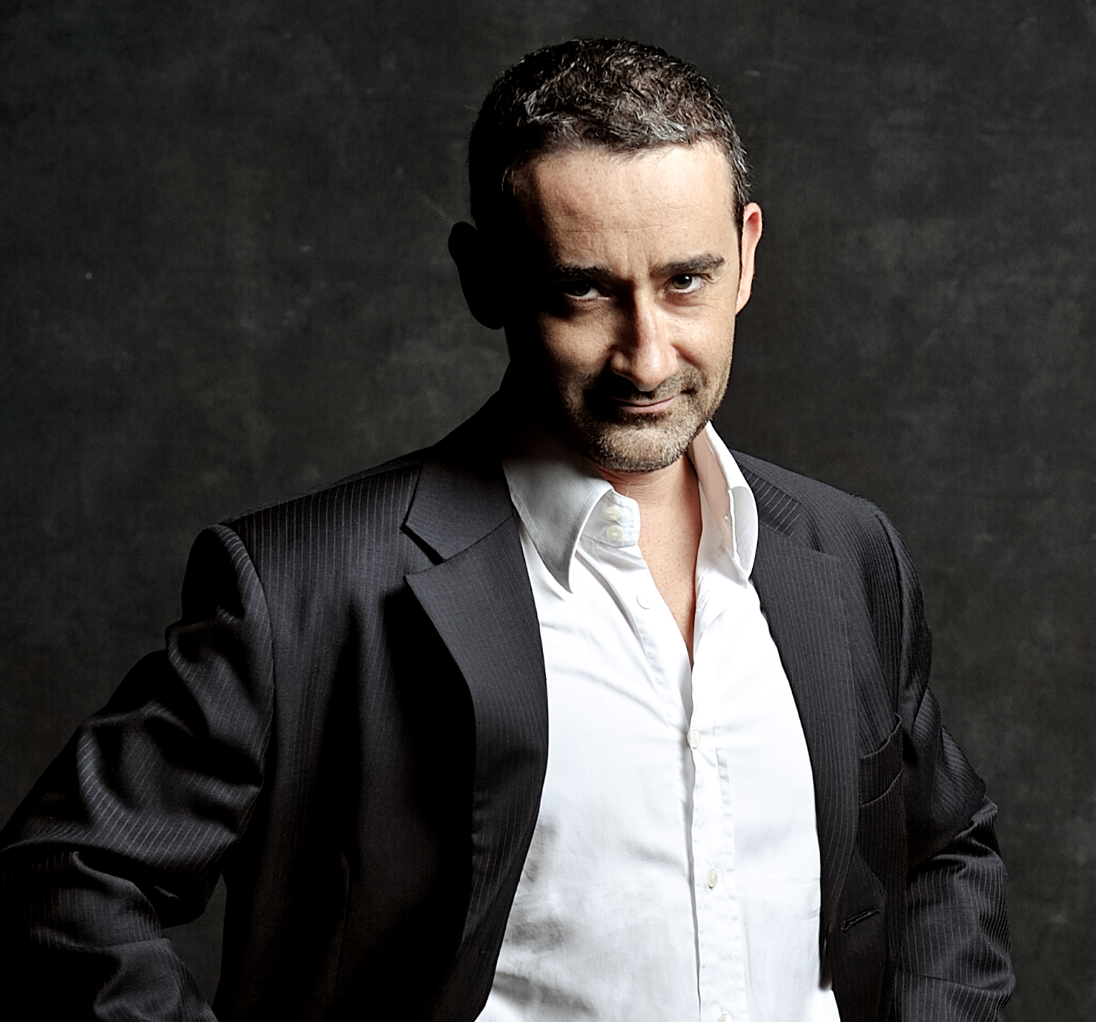 Enric Martínez-Castignani